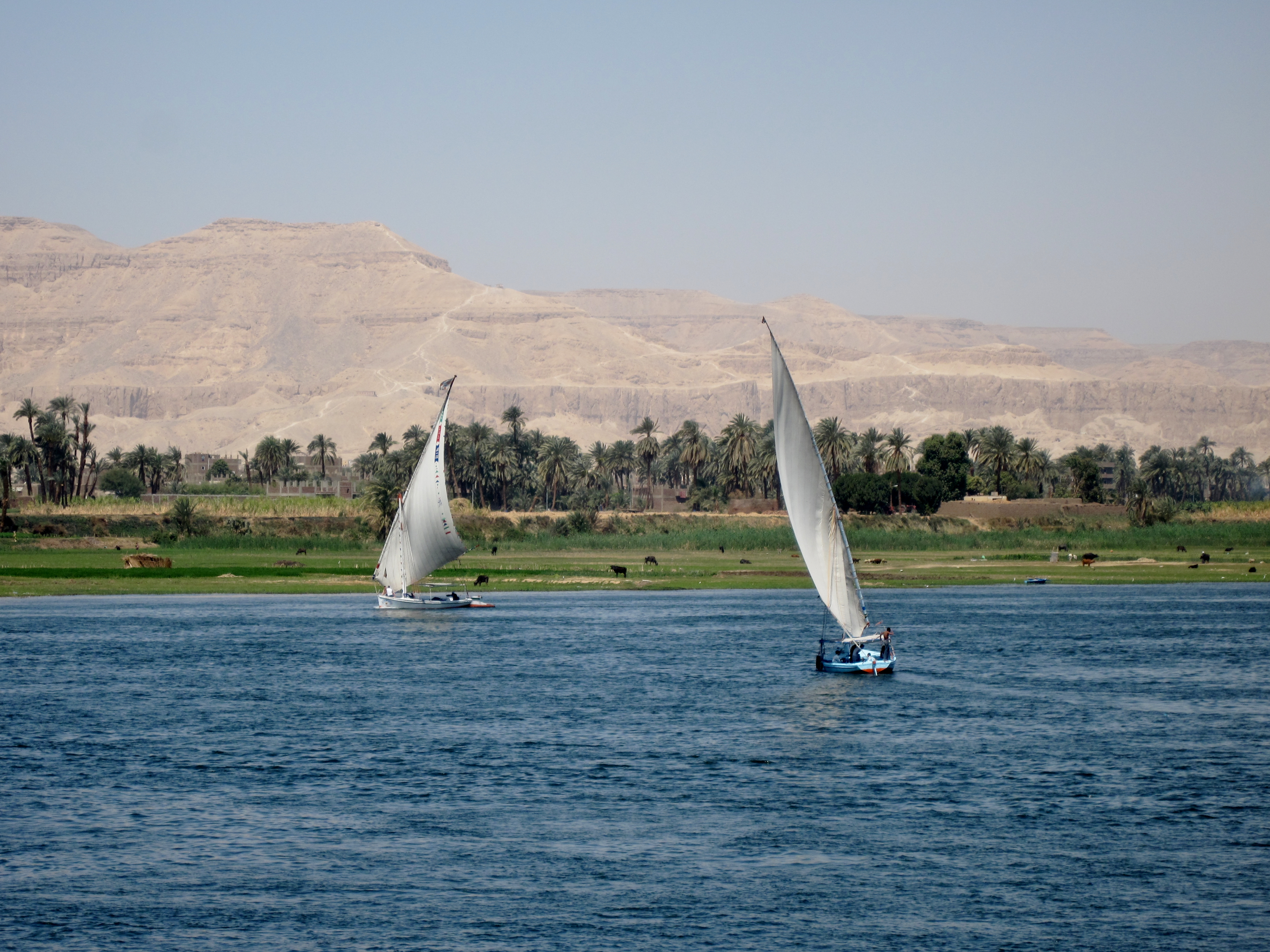 Westufer des Nil bei Luxor, Ägypten